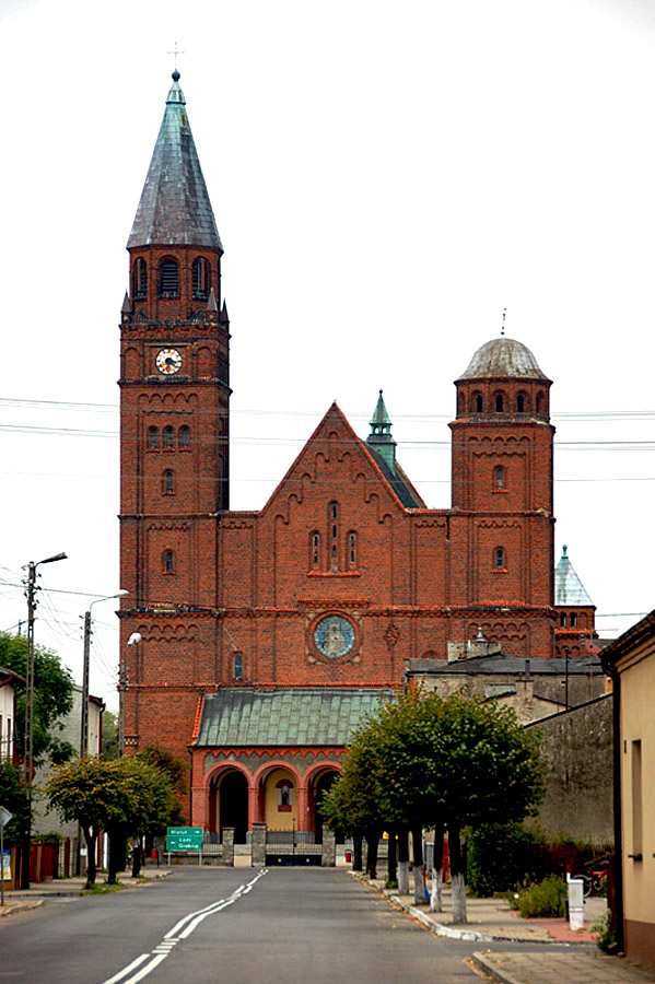 Lututów - kościół parafialny pw. śś. Apostołów Piotra i Pawła (zabytek nr 302 z 30.09.1981)